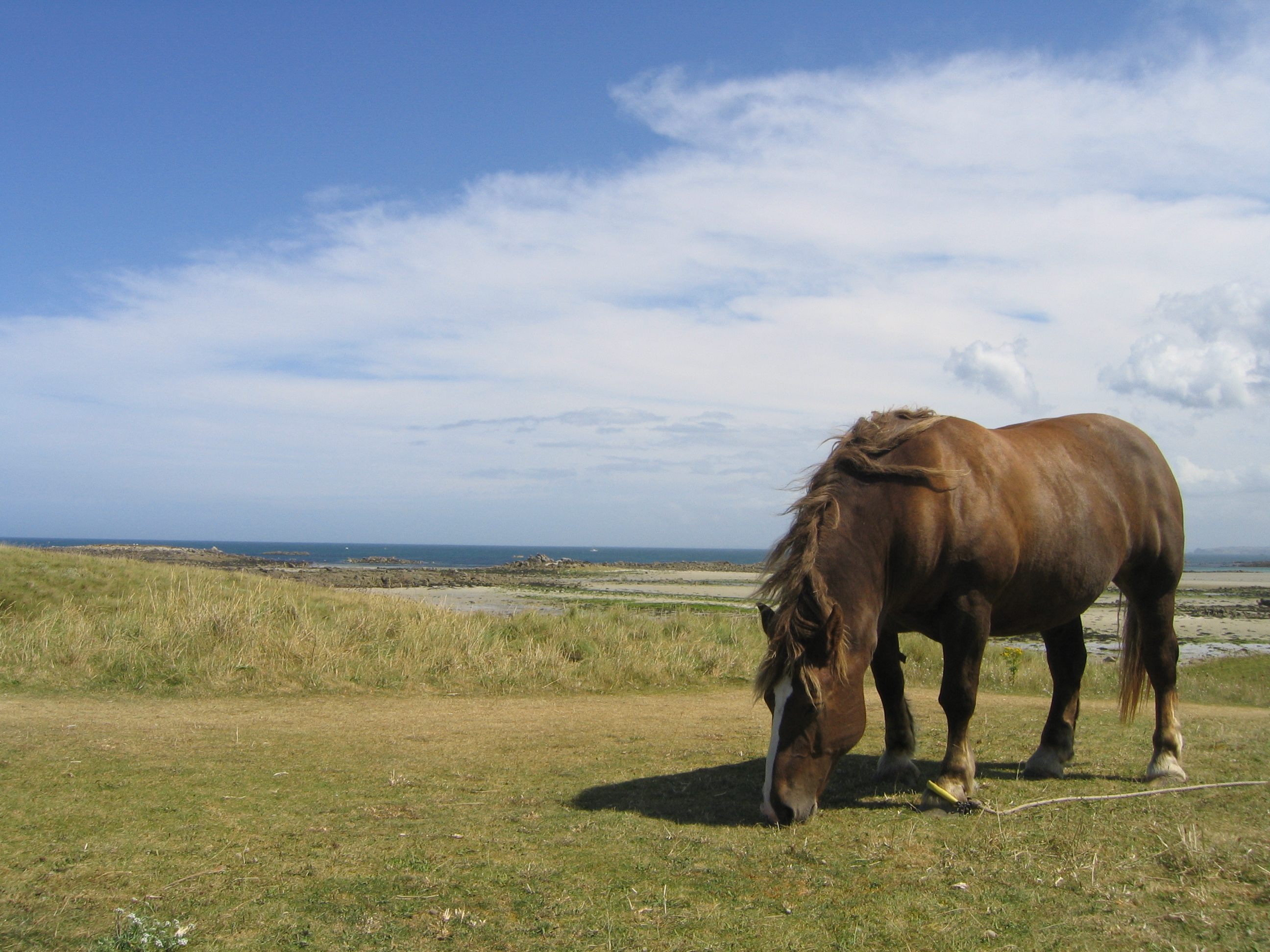 Vue de l'île de Batz